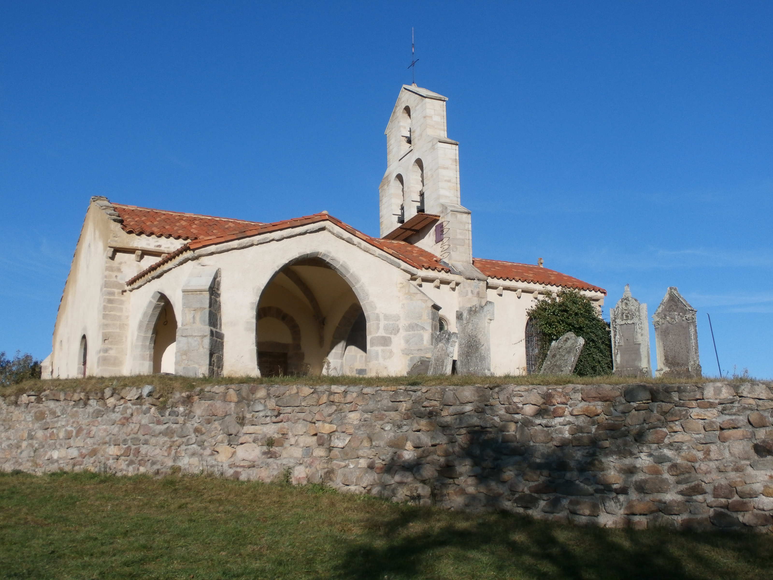 L'église de Saint-Jean-Saint-Gervais, son cimetière et sa ganivelle. .